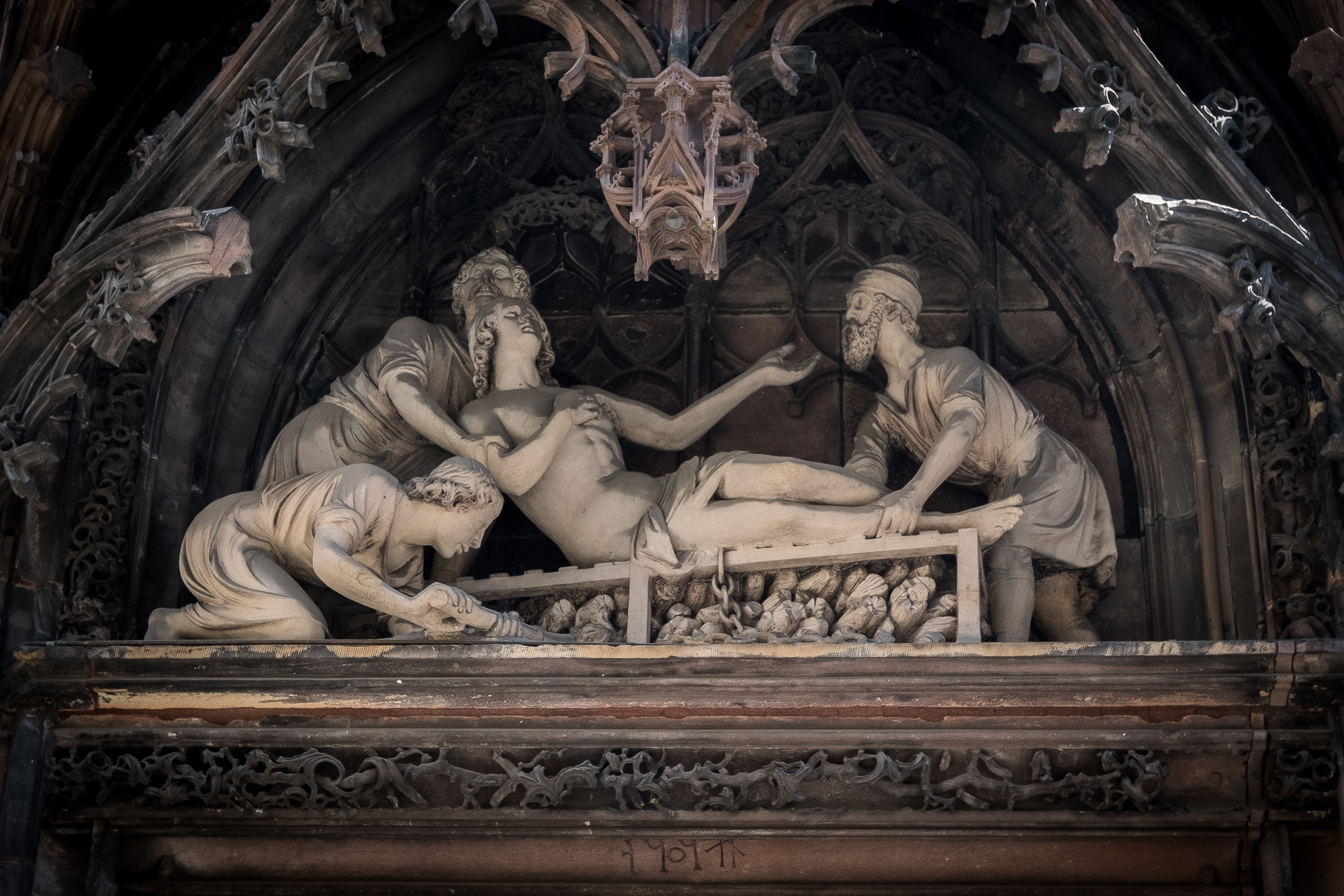 Alsace, Bas-Rhin, Cathédrale Notre-Dame de Strasbourg (PA00085015).Façade nord, Portail Saint-Laurent (XVe-XVIe): Tympan « Martyr de Saint-Laurent »